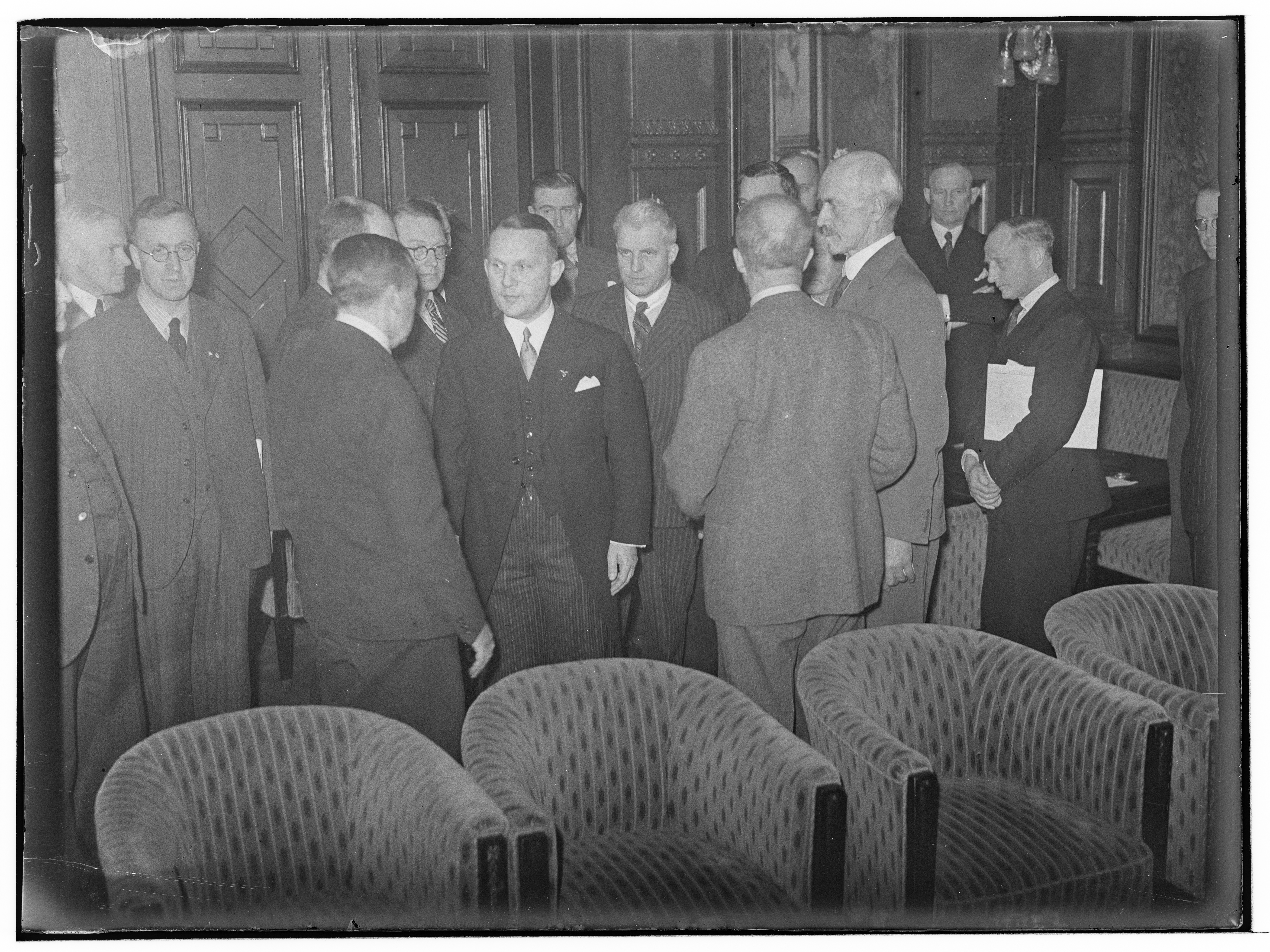 Administrasjonsrådets første møte, Vitenskapsakademiet